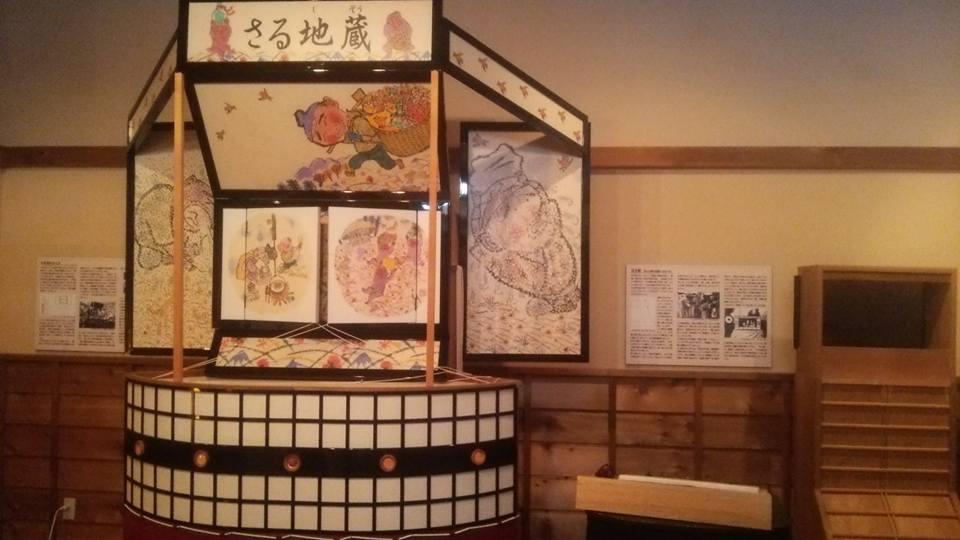 民話と紙芝居の家(2016.1.13)